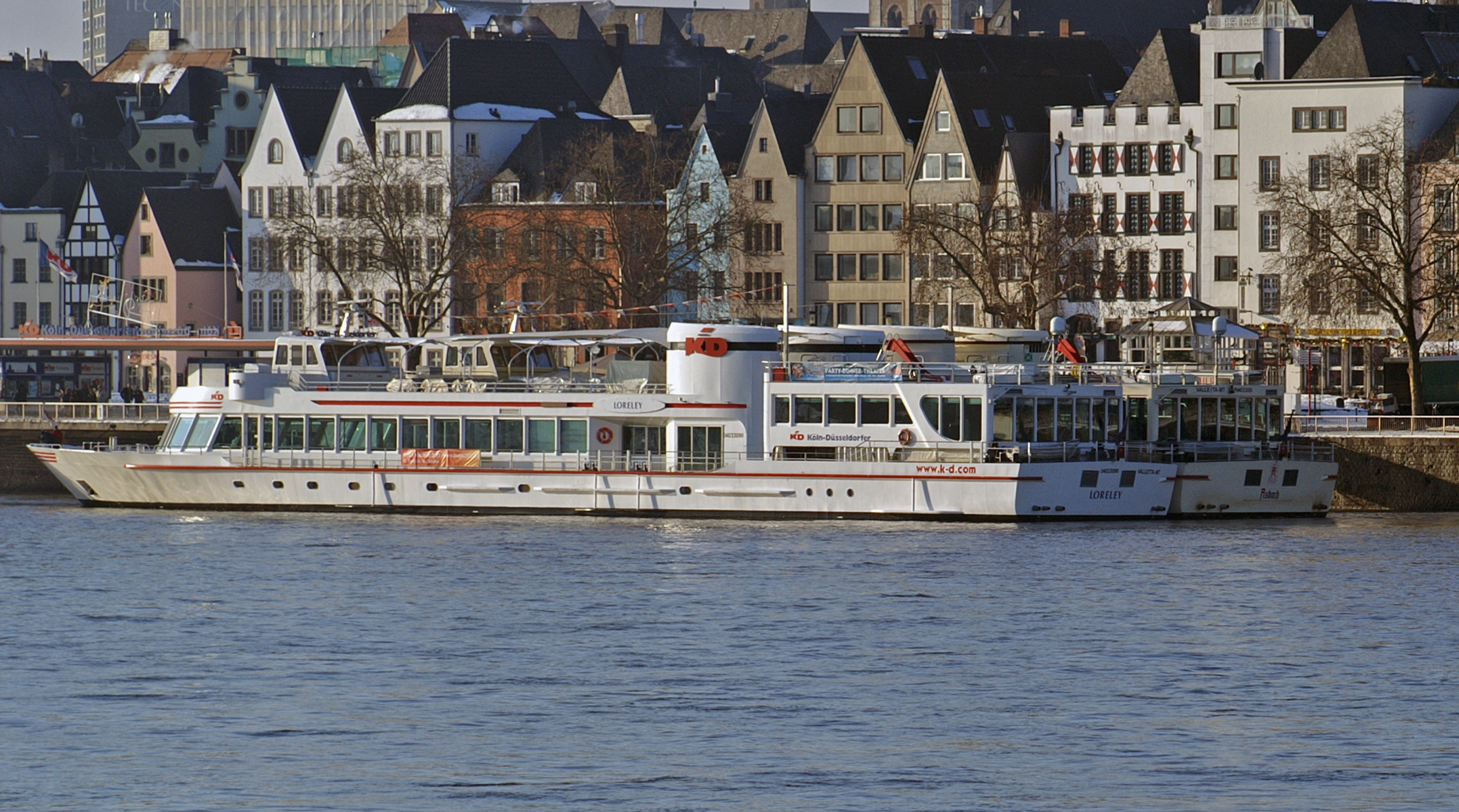 Die MS Loreley gemeinsam mit ihrem Schwesterschiff MS Asbach am Anleger 3, Frankenwerft in Köln.